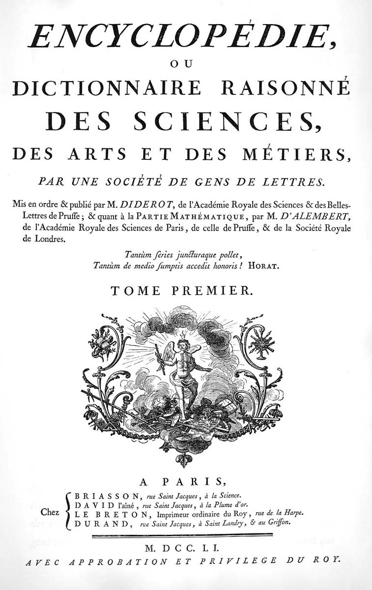 Page de couverture de l'Encyclopédie.